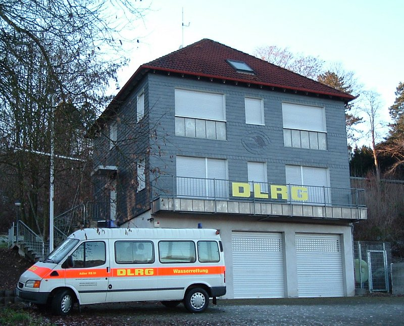 Wasserrettungs- und Schulungsstation der DLRG, Kräwinklerbrücke in Remscheid